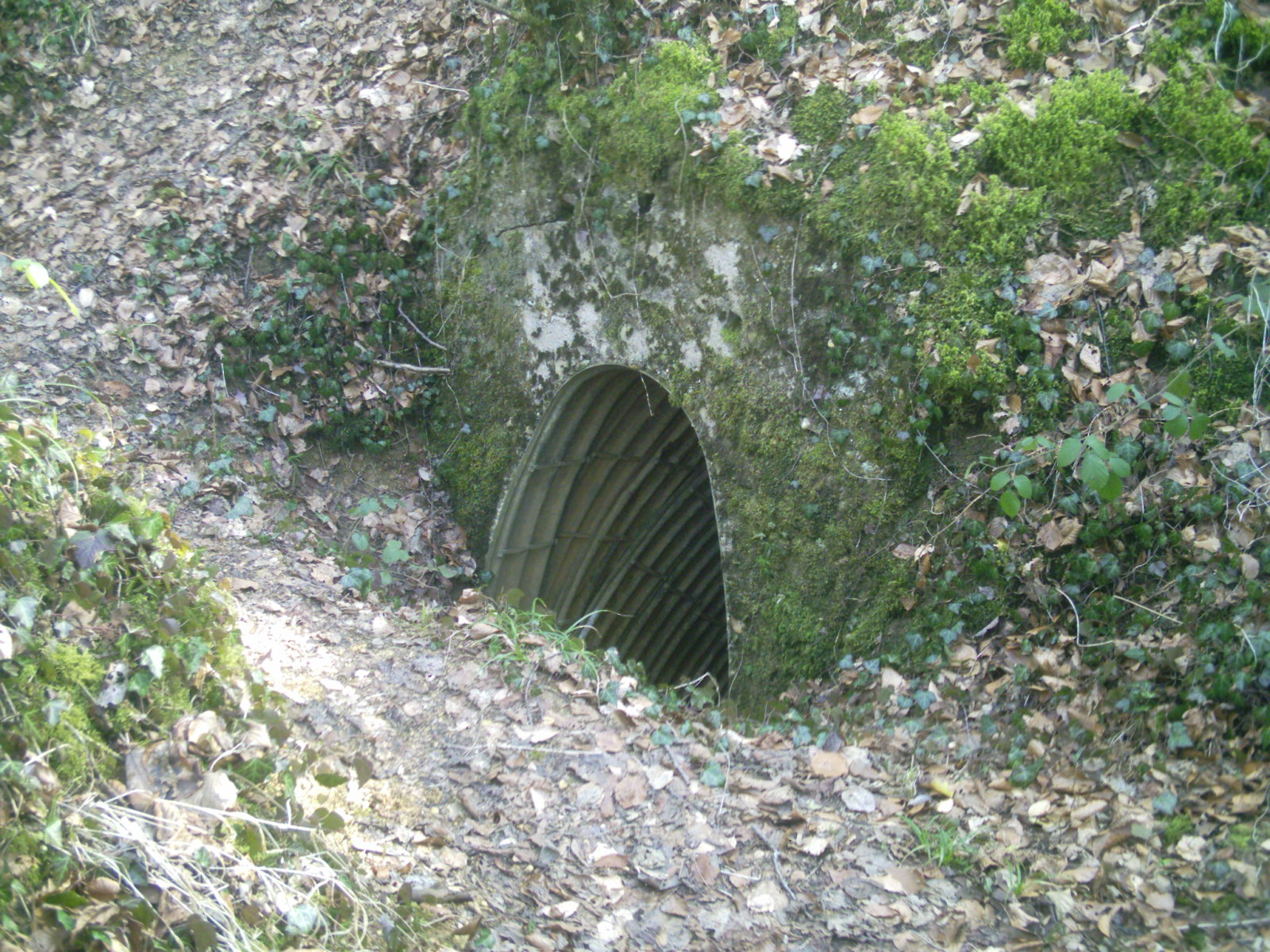 Entrée d'une sape des tranchées de la croix des Carmes